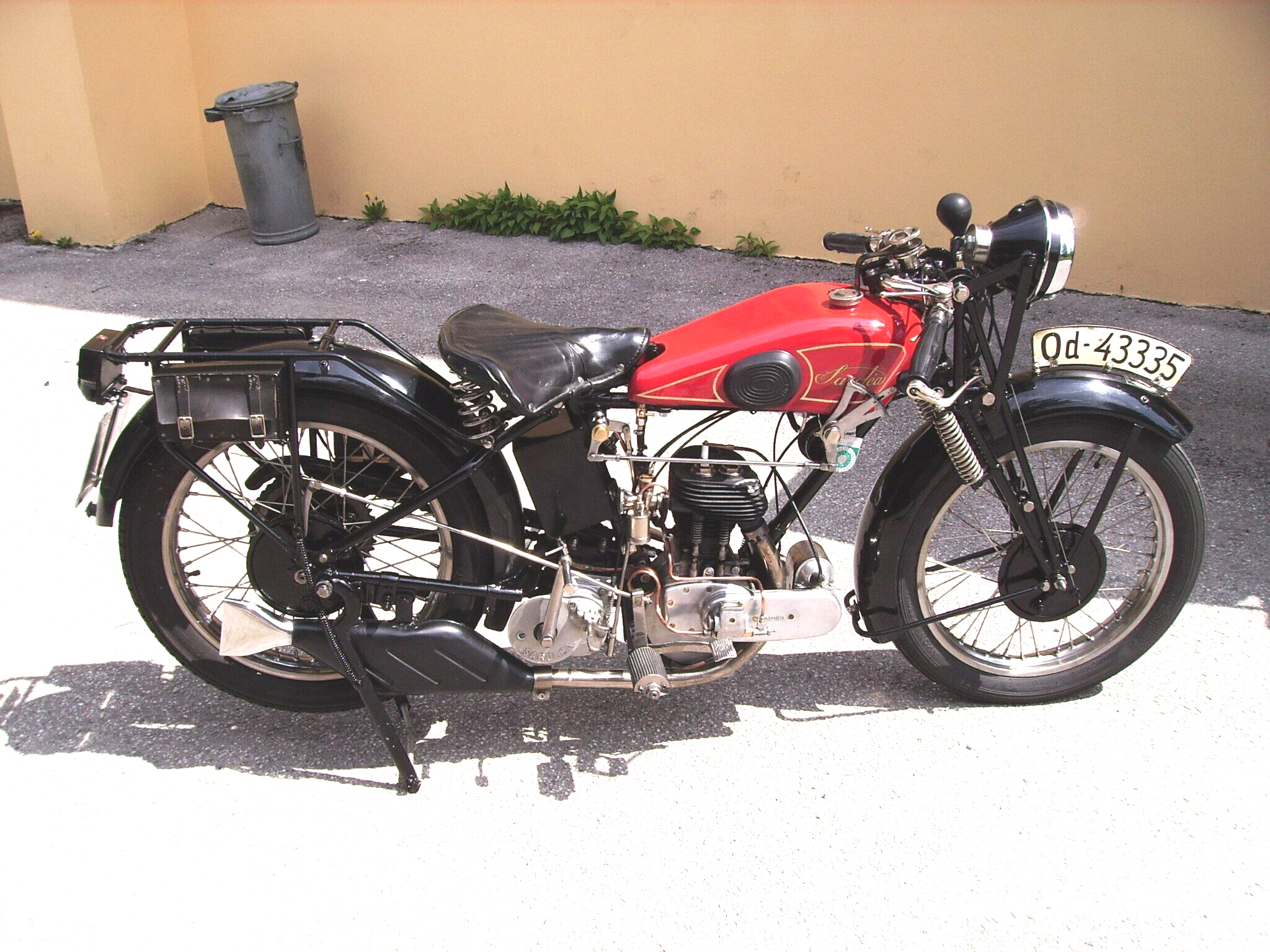 Sarolea Tourist 350 -O wird ständig bewegt - auf Saisonkennzeichen in Österreich zugelassen.